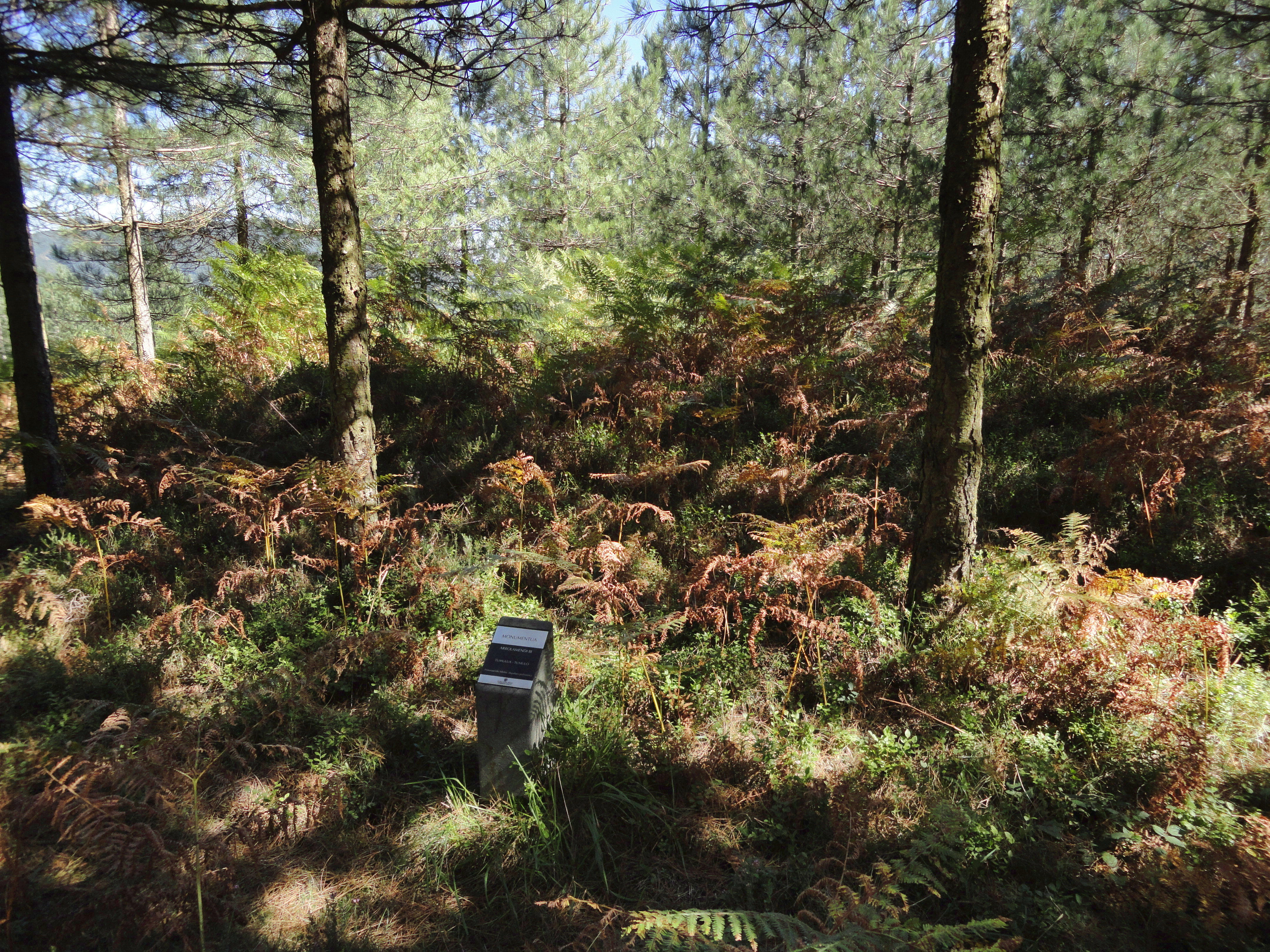 Arrolamendi III tumulua